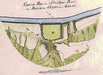 Alteni ordulinnus. Plaan XIX sajandist. Ülevalpool on kirdesuund.